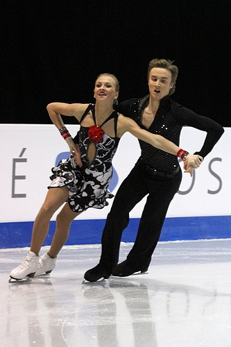 Виктория Синицина и Руслан Жиганшин на финале Гран-при среди юниоров сезона 2011-2012